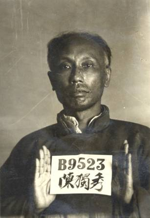 陈独秀于1921年10月4日被上海法租界巡捕逮捕后拍摄的半身像